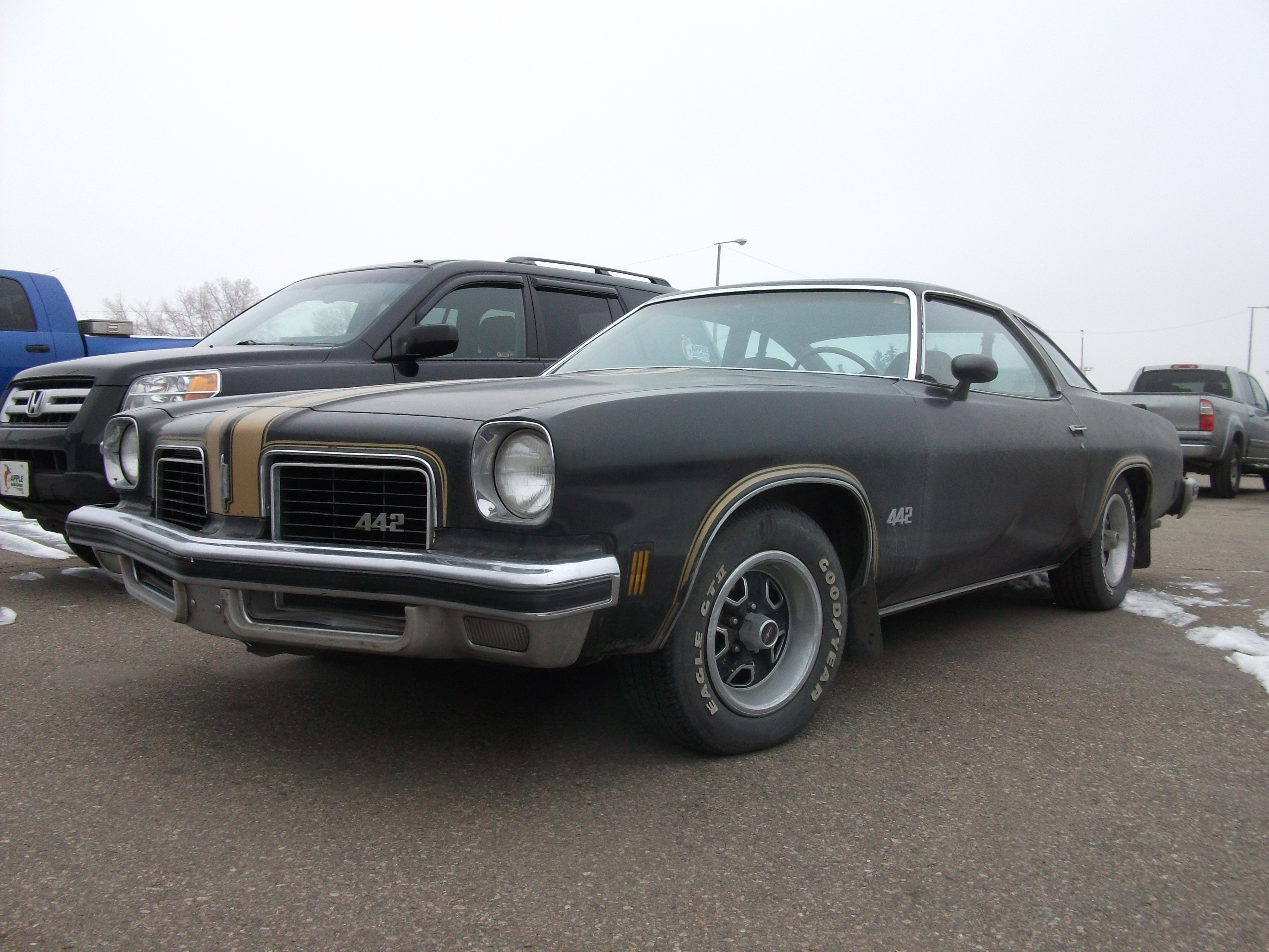 Oldsmobile 442